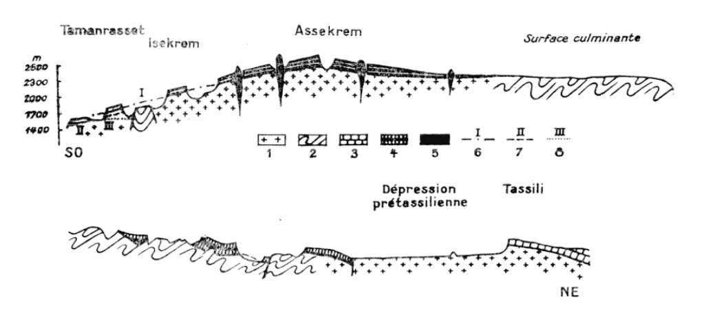 Topographie du massif de l'Assekrem (dessin)